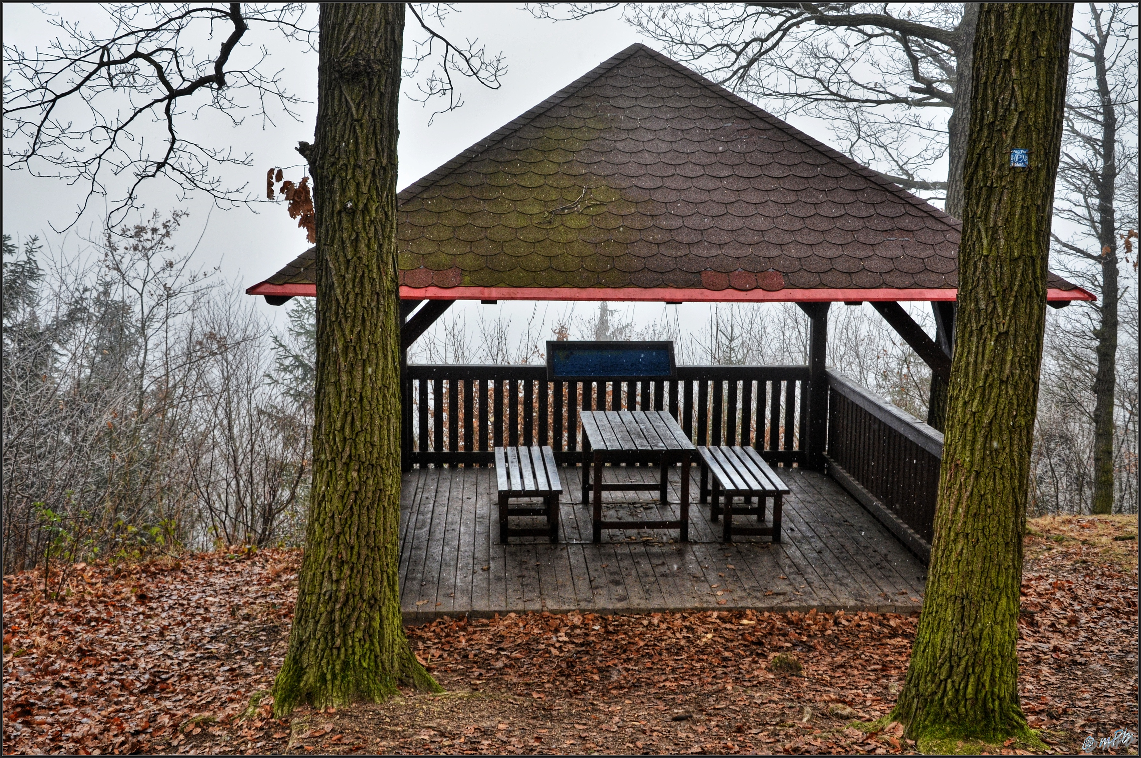 V lese, cestou z Peruce na Chraštín, je místo, z kterého je úžasný výhled na České středohoří. Již v 19. století sem rád chodil spisovatel Svatopluk Čech, jehož rodina z Peruce pocházela.